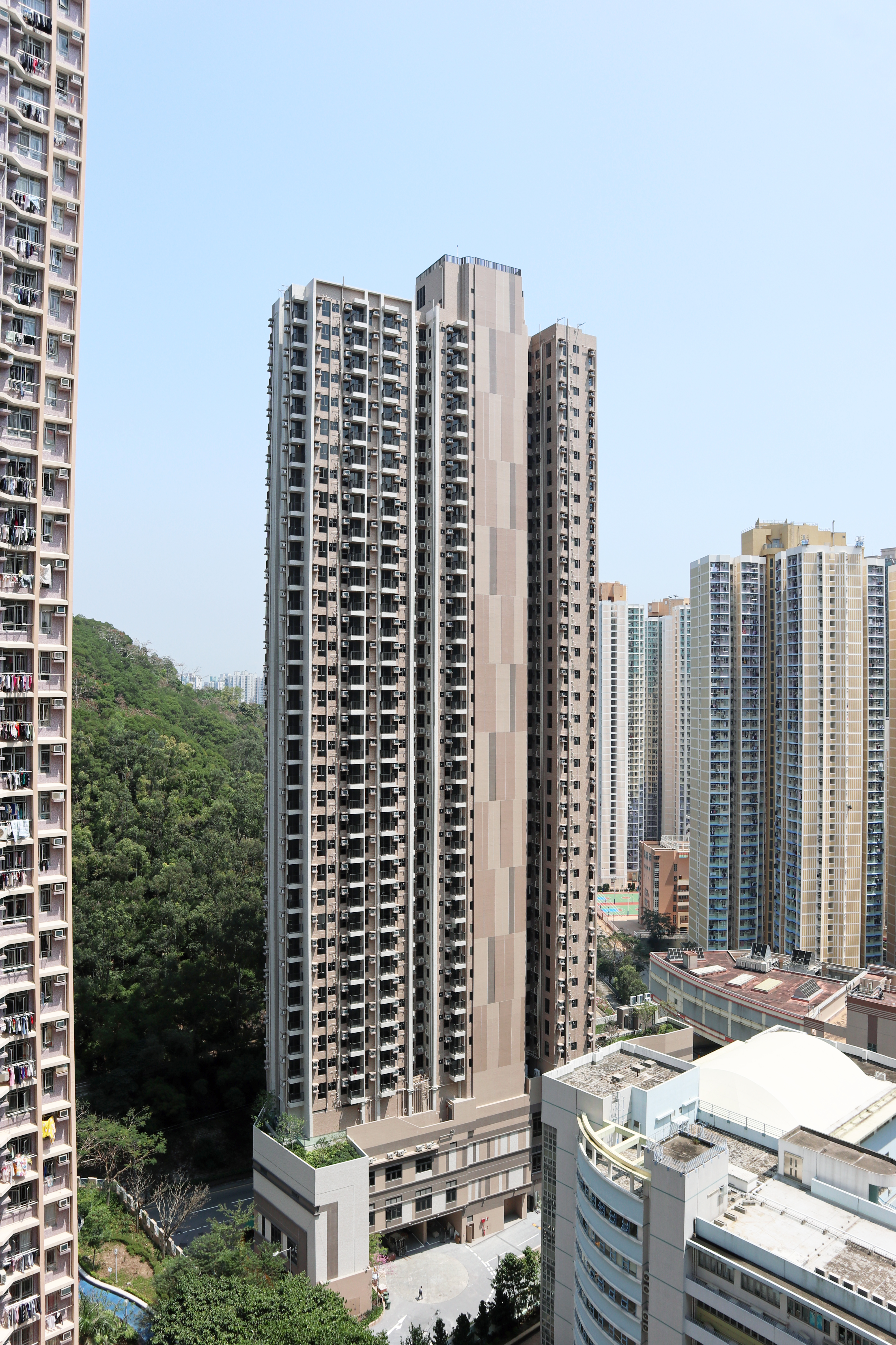 調景嶺翠嶺峰外觀